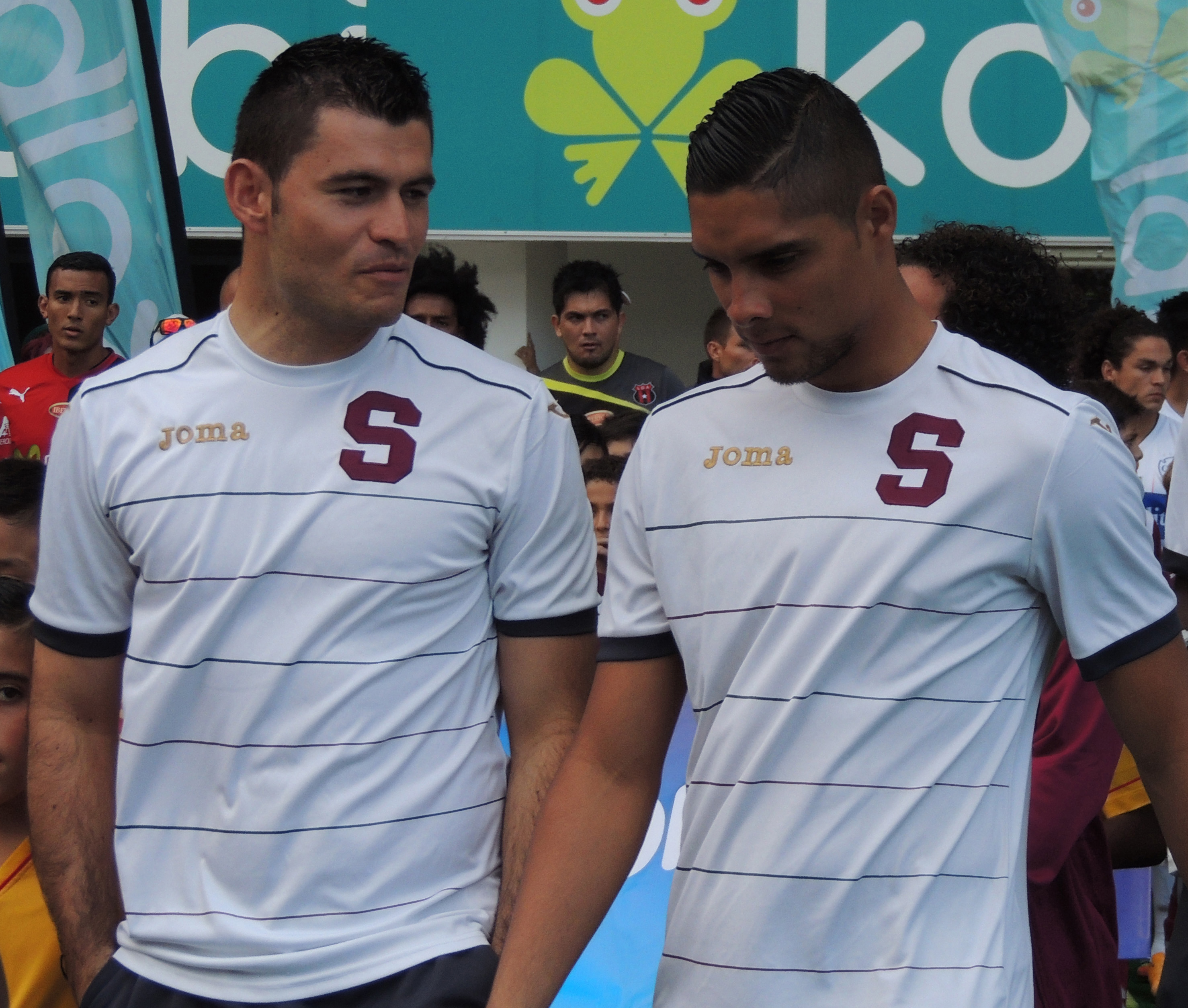 Esta obra de Luis Manuel Madrigal está bajo una licencia de Creative Commons Reconocimiento-CompartirIgual 4.0 Internacional. Para una versión sin logo escriba a